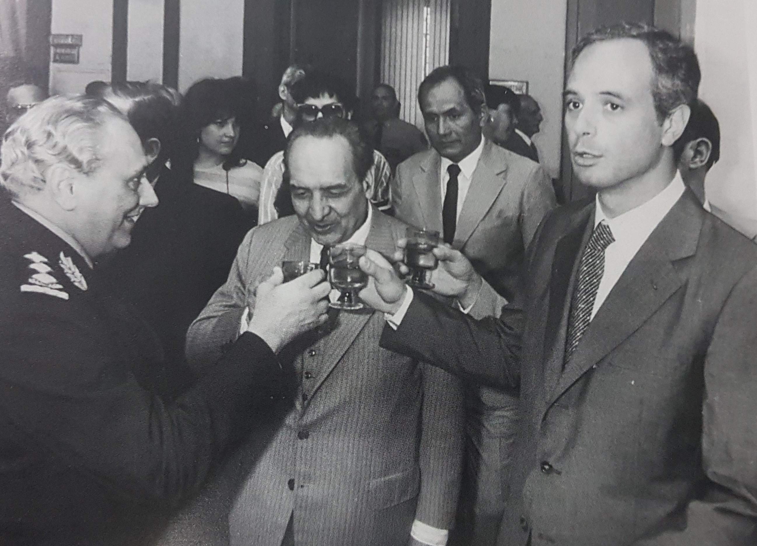 De izquierda a derecha, José Ángel Pirker, Jefe de la Policía Federal, José Severo Caballero, juez de la Corte Suprema y el ministro Enrique Nosiglia.